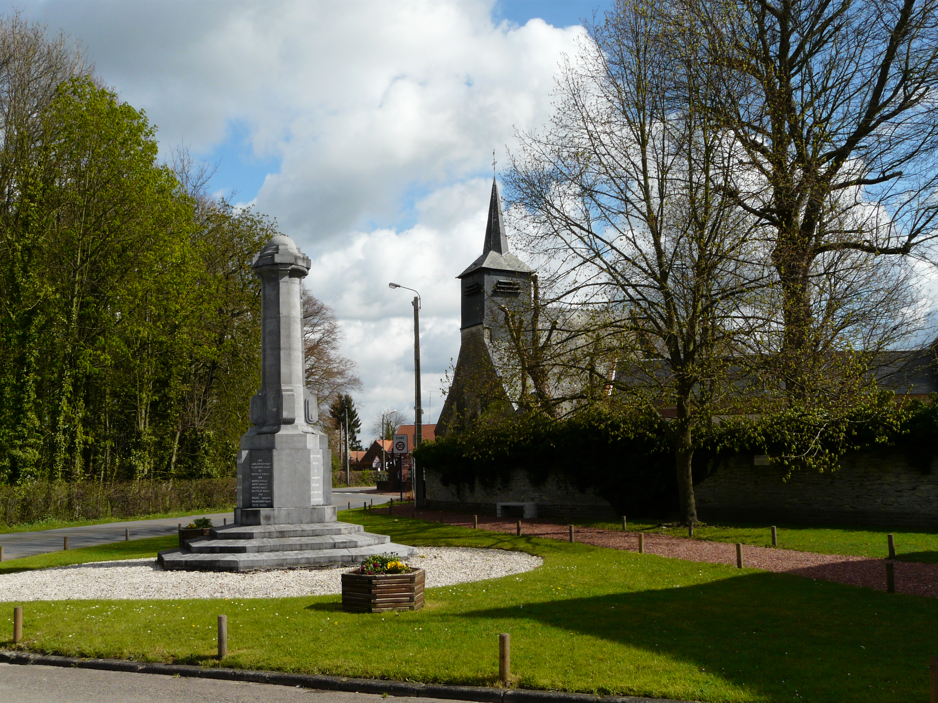 Le monument aux morts, l'église et l'arbre de la liberté à Thun-Saint-Martin (Nord)